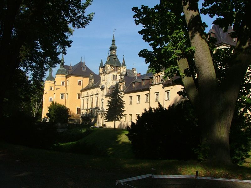 Kliczków 8 - zamek